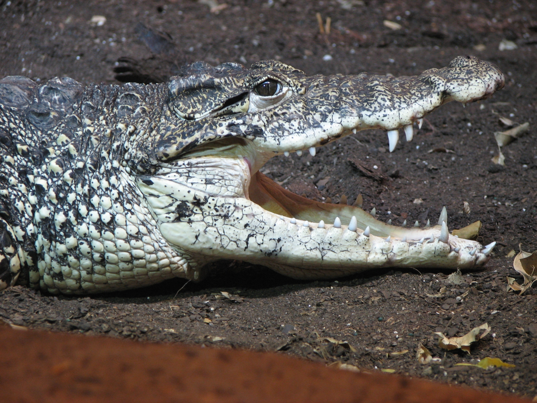 Cuban Crocodile - Crocodylus rhombifer